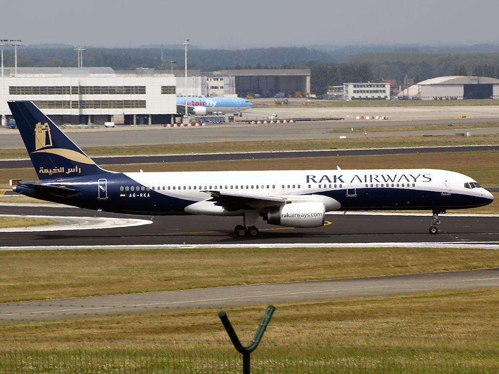 Boeing 757-200 der RAK Airways in Brüssel